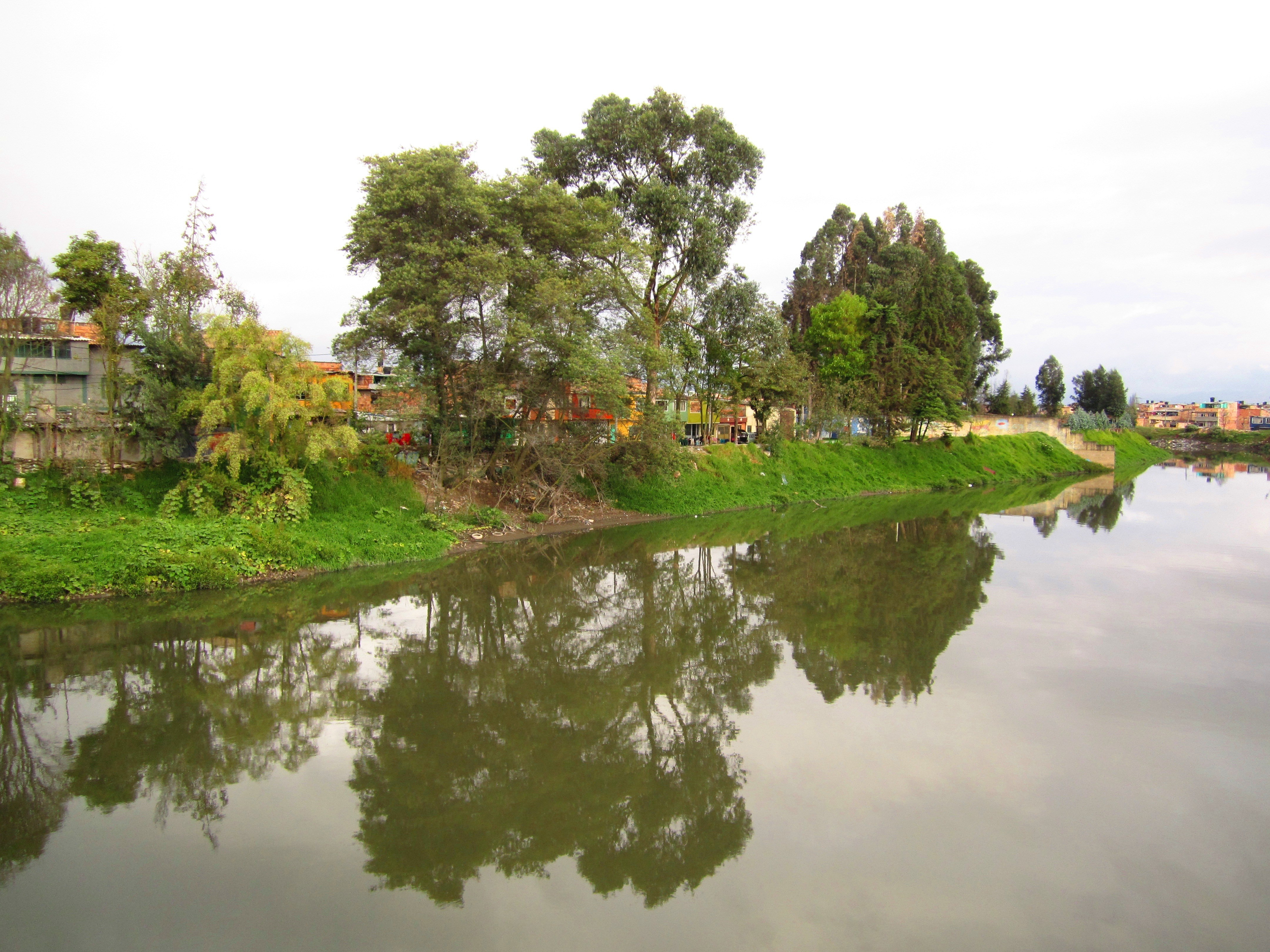 Bogotá